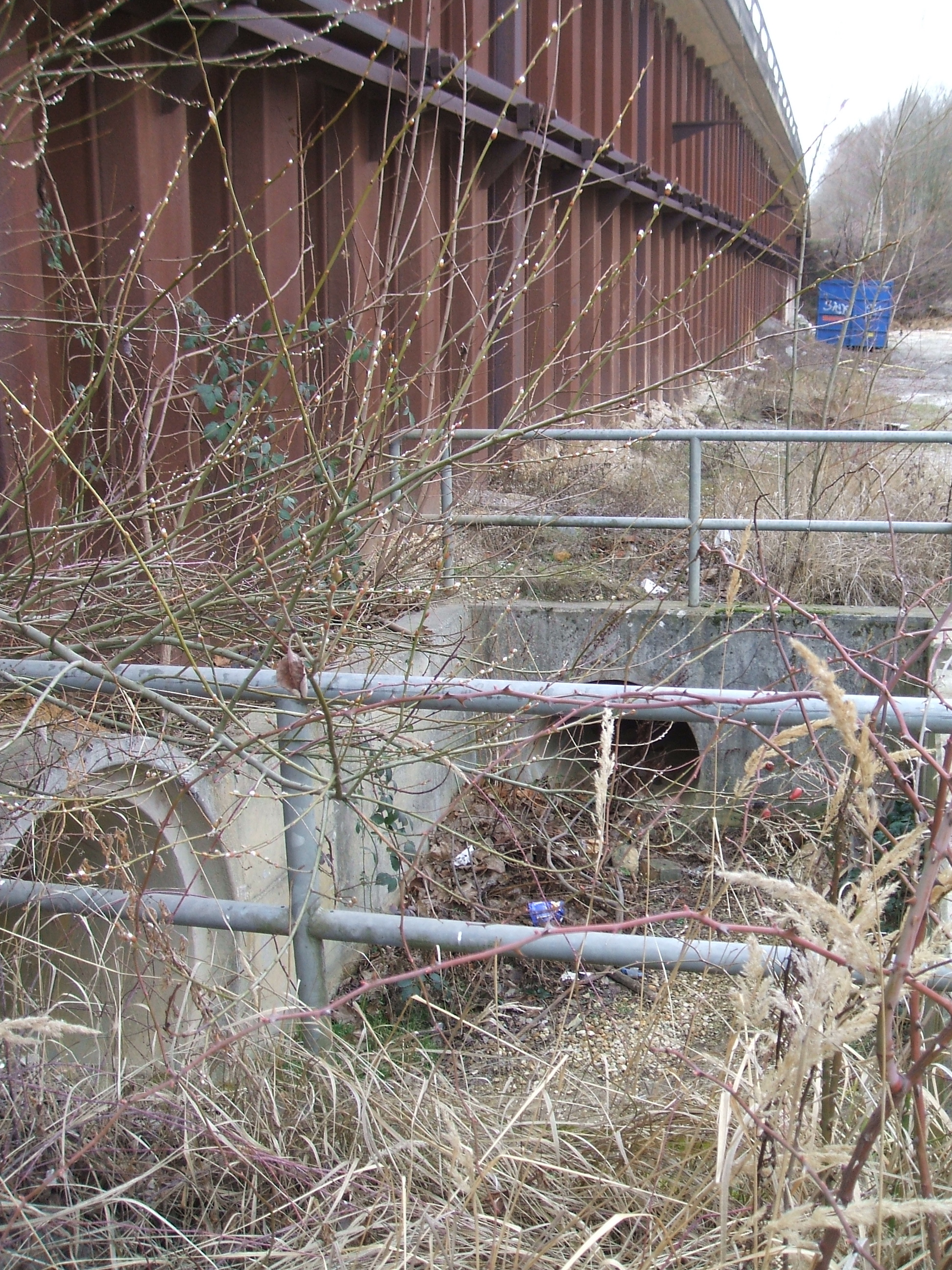 Becken des Säckelgrabens in Kiesgrube an der Spundwand des Neubaus der B 3, wo er seine Verrohrung verlässt und nach rechts (im Bild links) in die Unterführung unter B 3 und Main-Weser-Bahn biegt